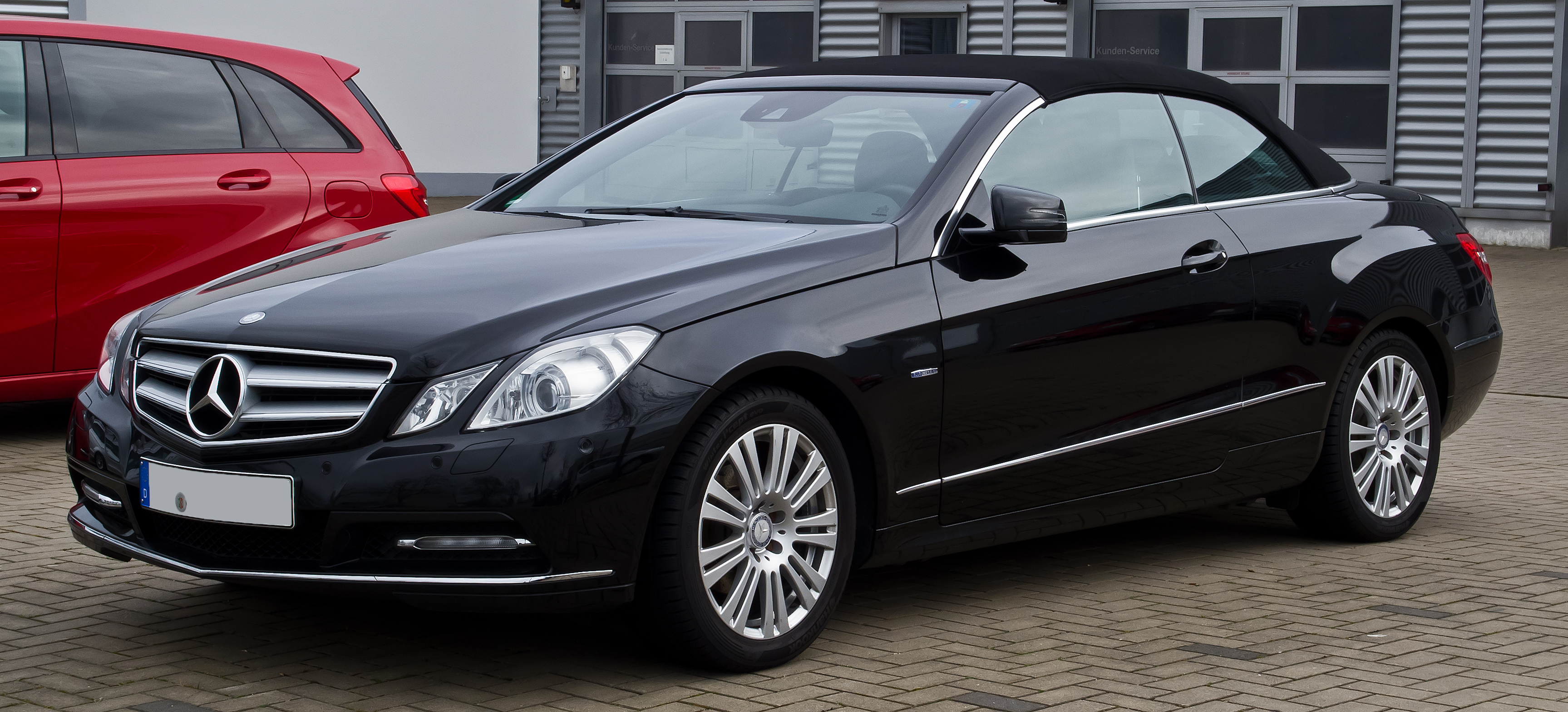 Mercedes-Benz E-Klasse Cabriolet BlueEFFICIENCY (A 207)